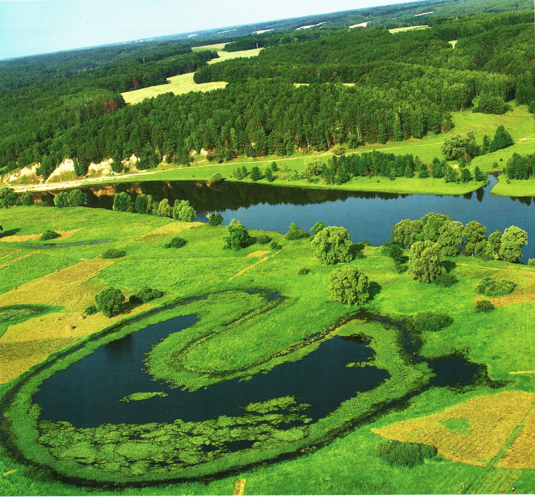 Мезинський НПП